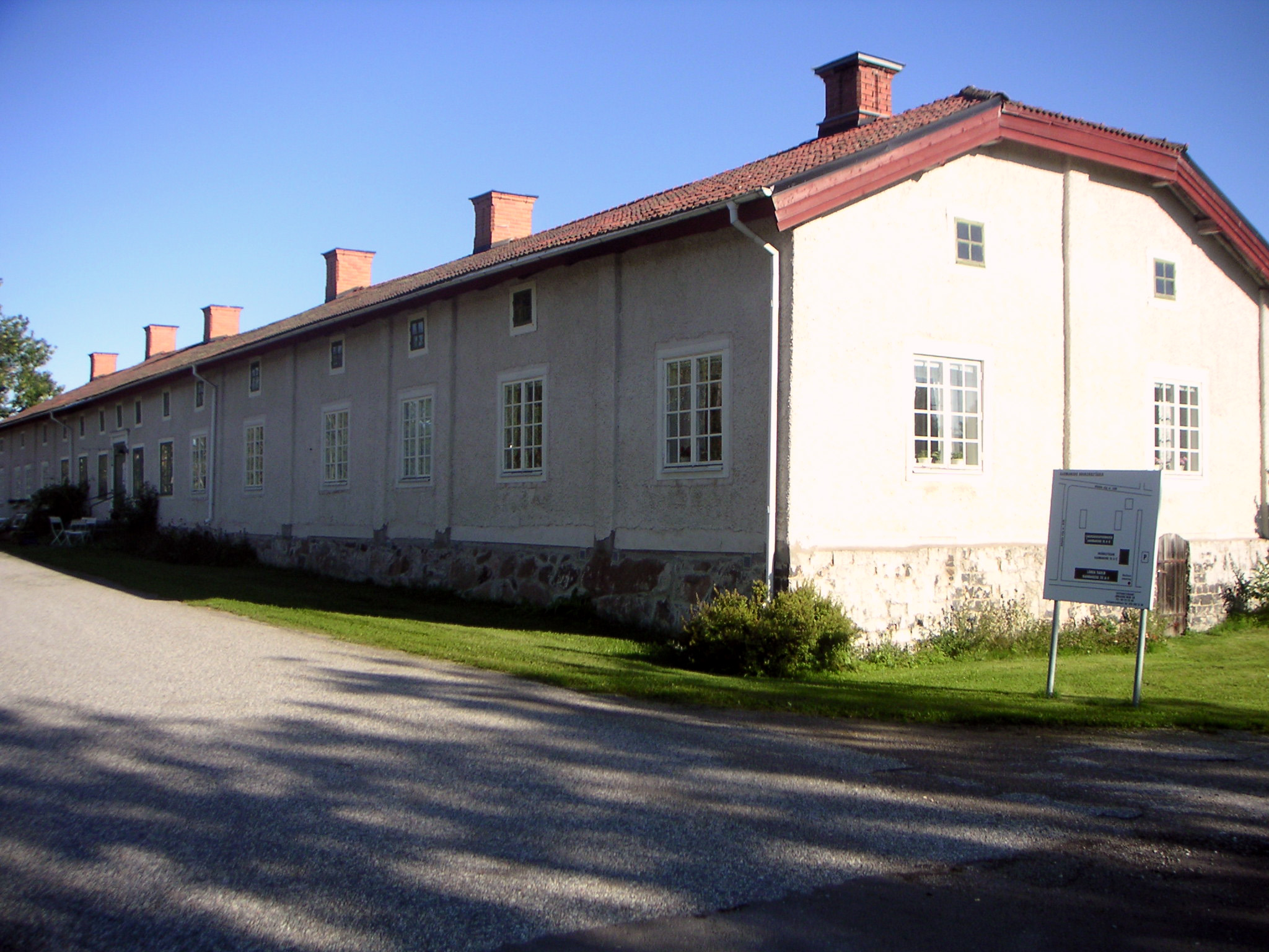 Långa Raden - smedbostäder vid Karmansbo bruk